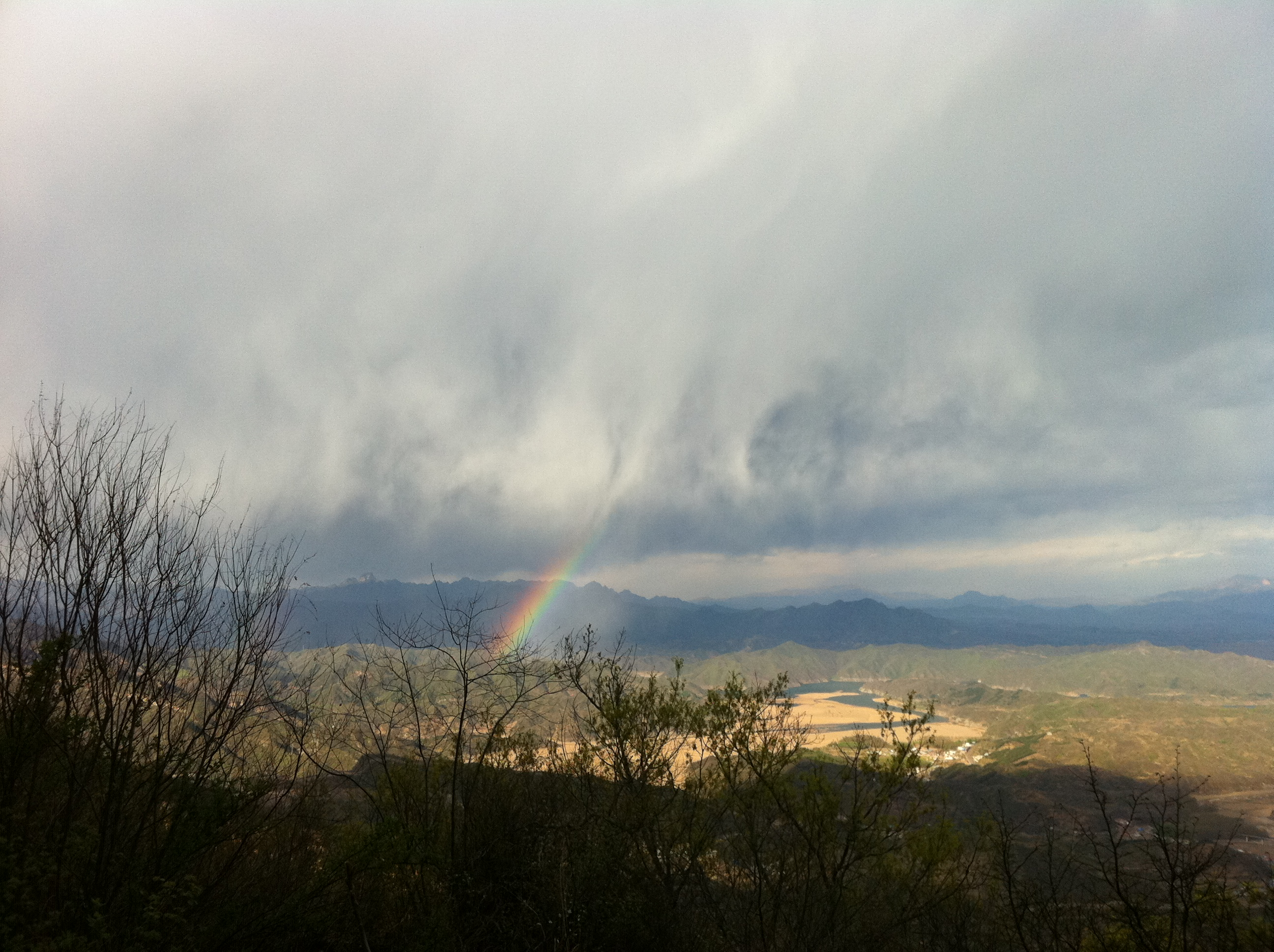 桃源仙谷，下山时偶遇彩虹